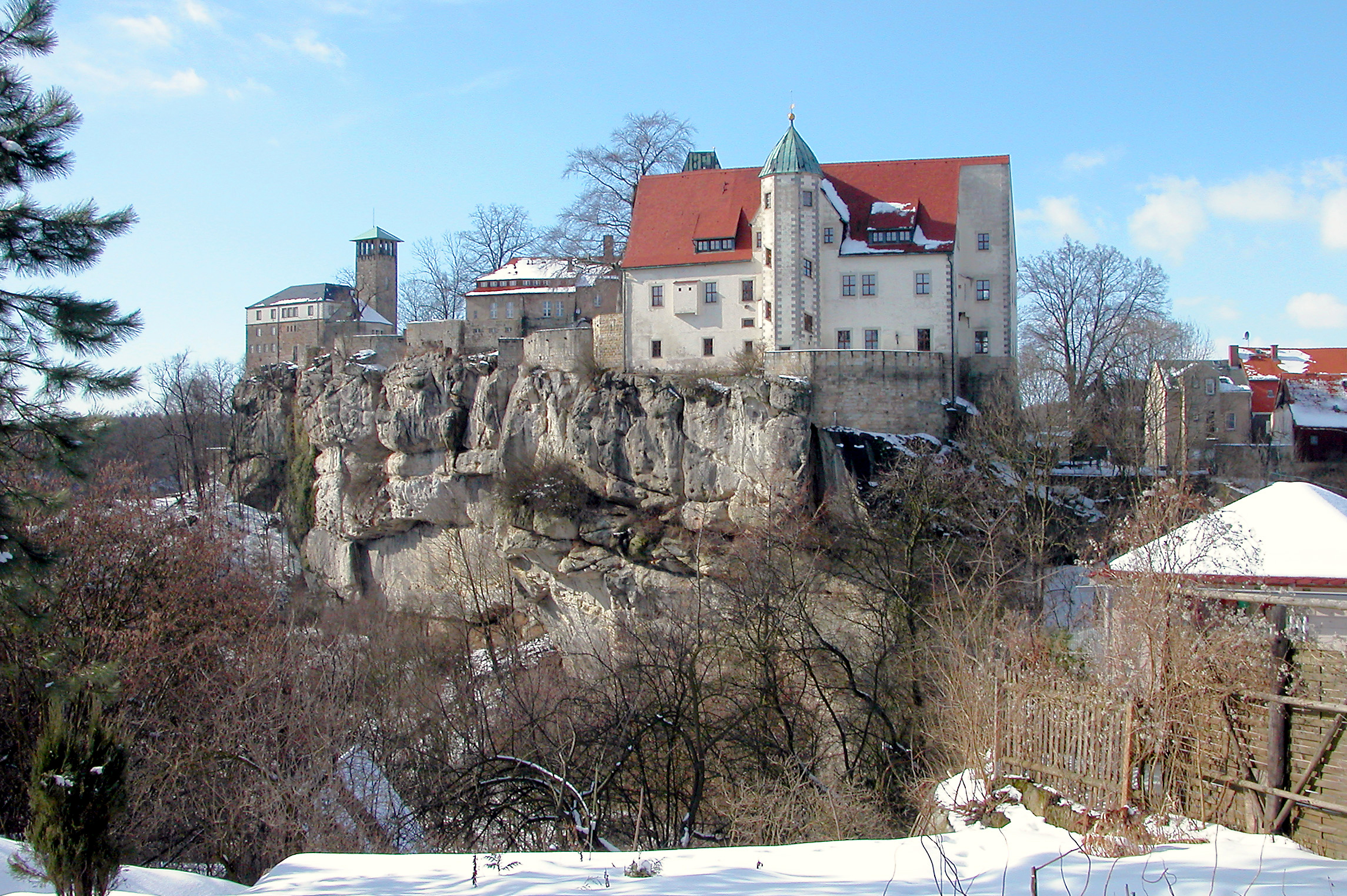 05.03.2006 01848 Hohnstein: Burg (GMP: 50.976628,14.109229). Ursprünge im 15 und 16. Jahrhundert. Blick von Osten. Links das hintere (ehemals Alte) Schloß. Mitte rechts das Neue Schloß (Renaissance um 1550). [DSCN8856.TIF]20060305265DR.JPG(c)Blobelt